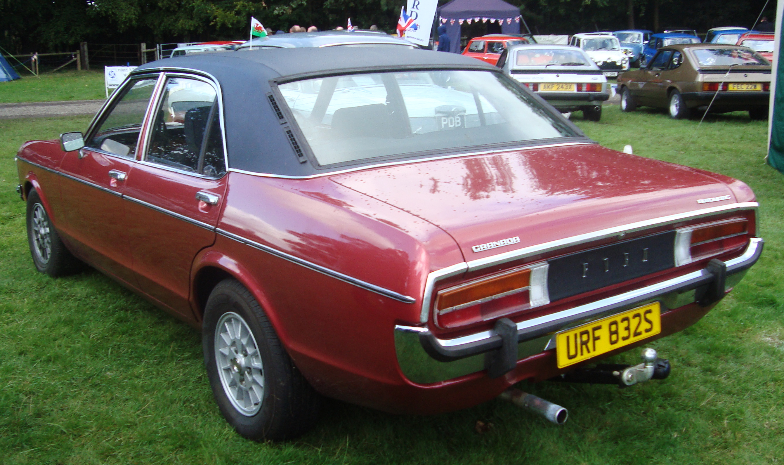 1977 Ford Granada 3.0 GL Auto